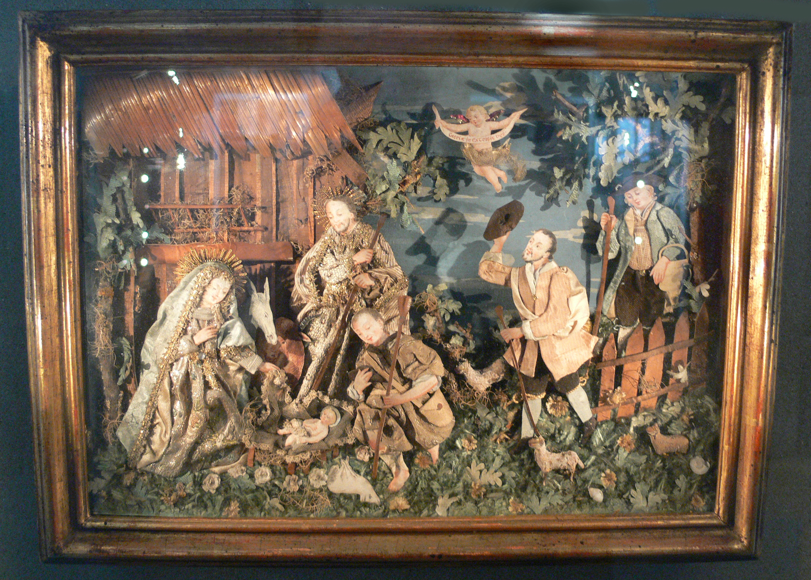 "Anbetung der Hirten", Materialbild im Kastenrahmen; Ausgburg um 1730; Krippensammlung des Bayerischen Nationalmuseums, München, Inv. Nr. 65/22